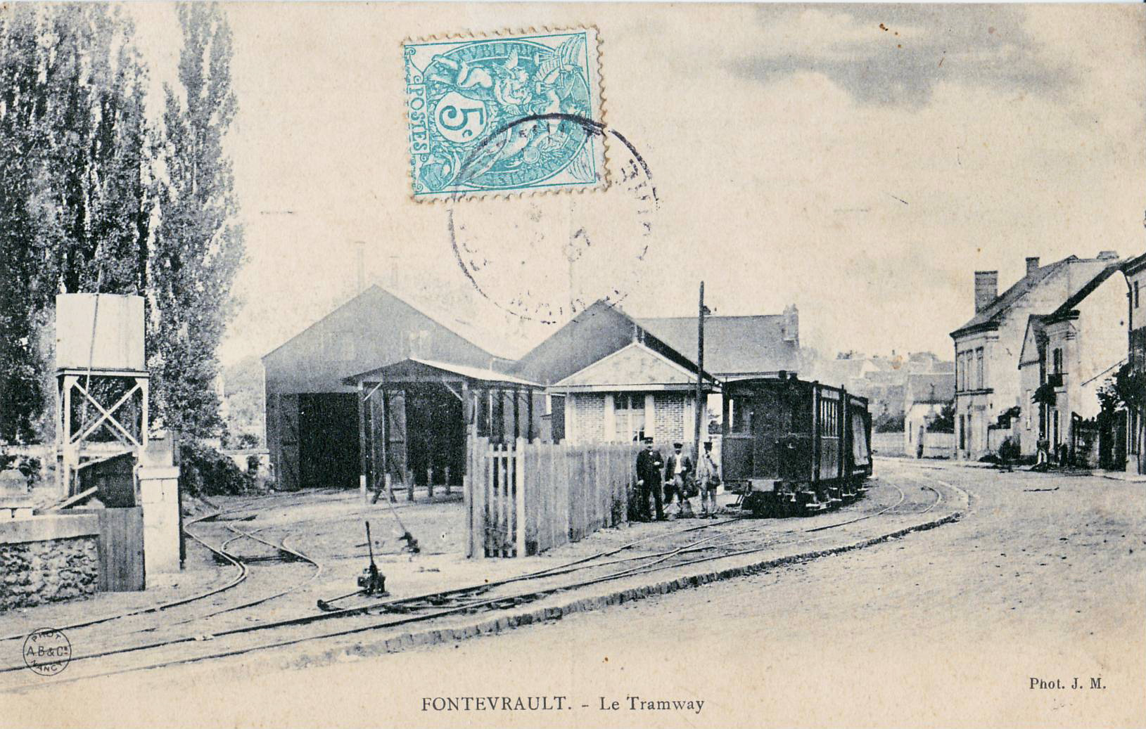 Carte postale éditée par JM - AB&C à Nancy :FONTEVRAUD - Le TramwayTramway de Saumur ligne Saumur PO - Fontevrault